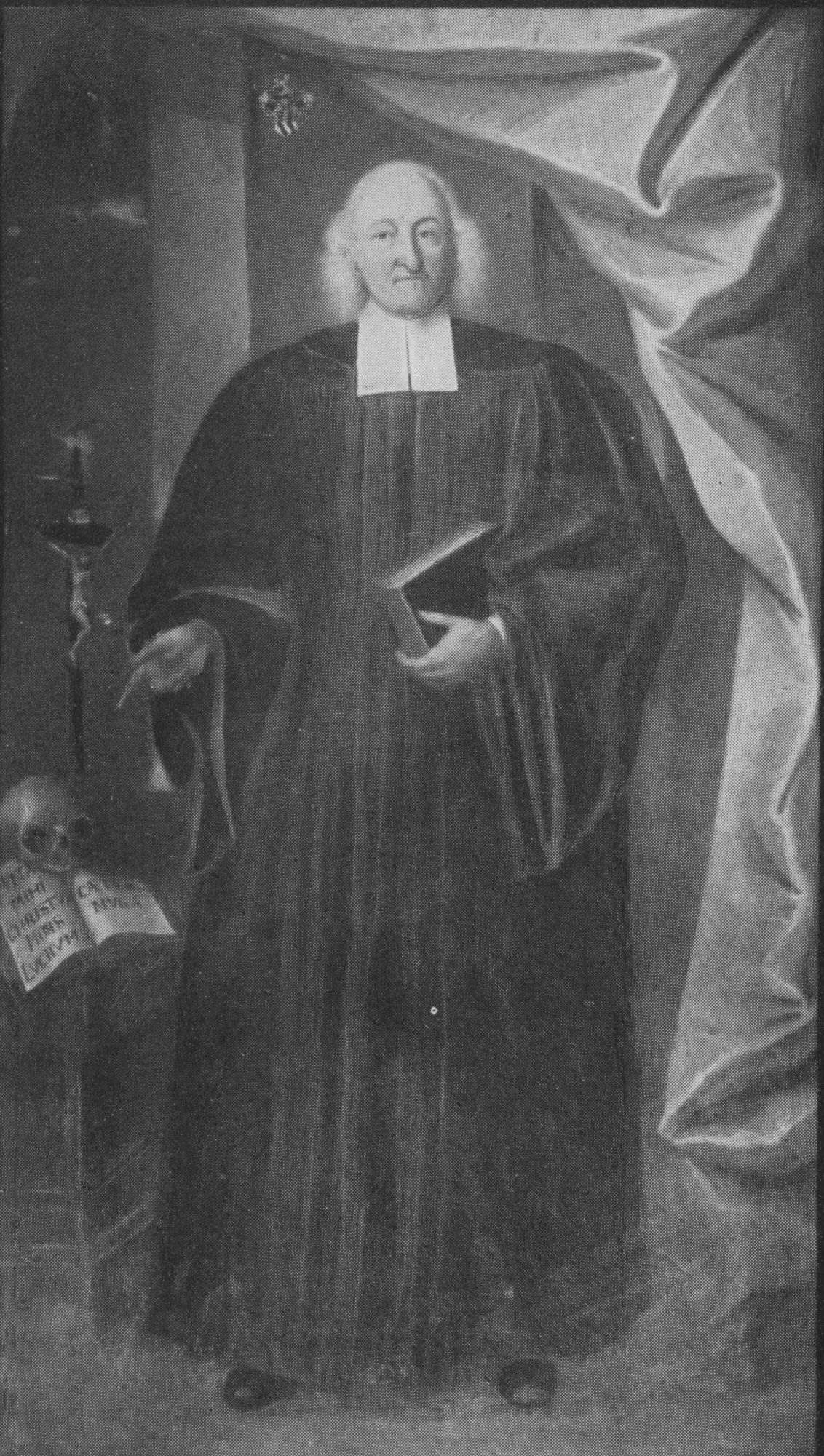 Christian Lehmann der Jüngere (1642—1723)